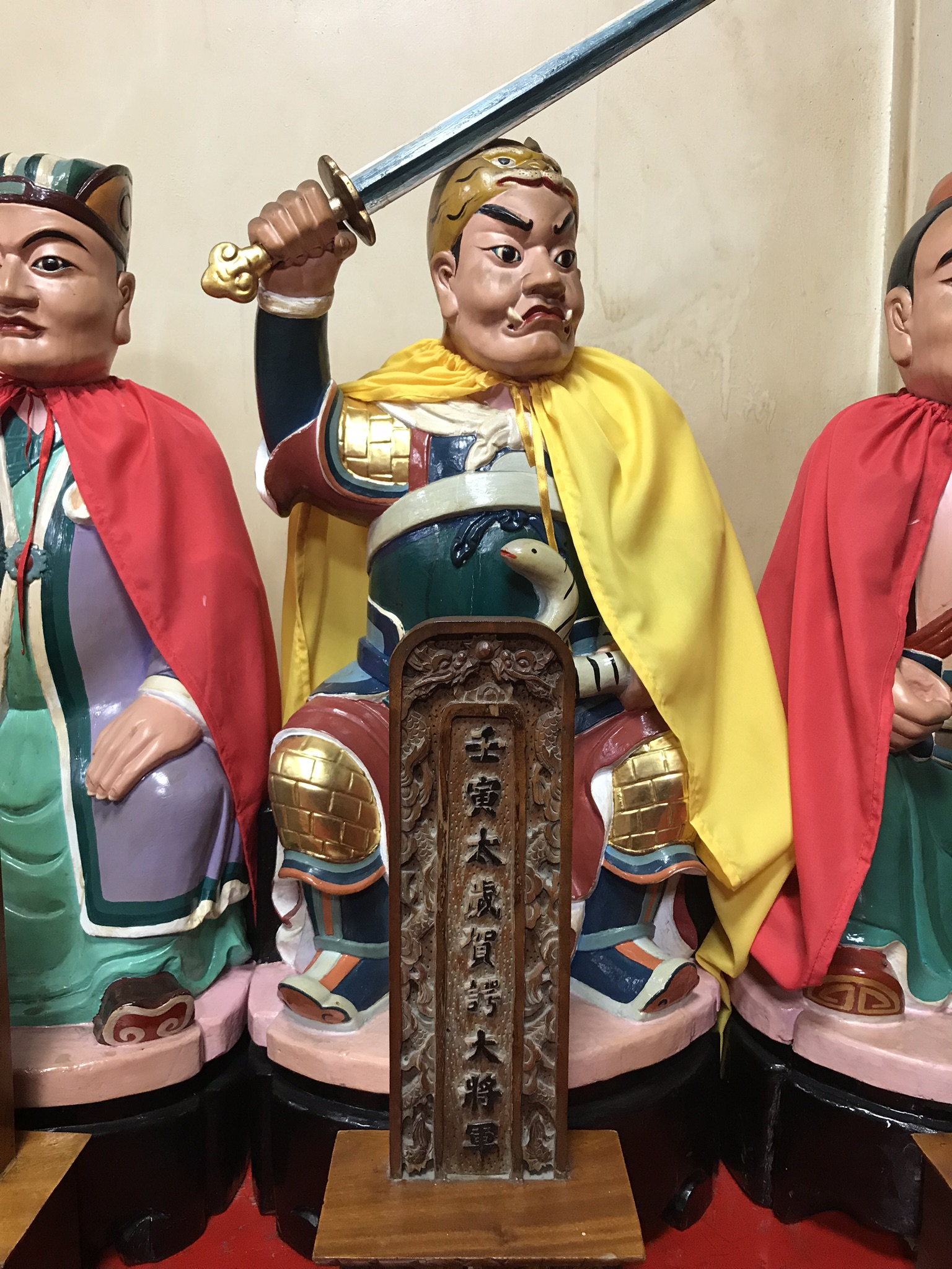 壬寅太歲賀諤大將軍神像